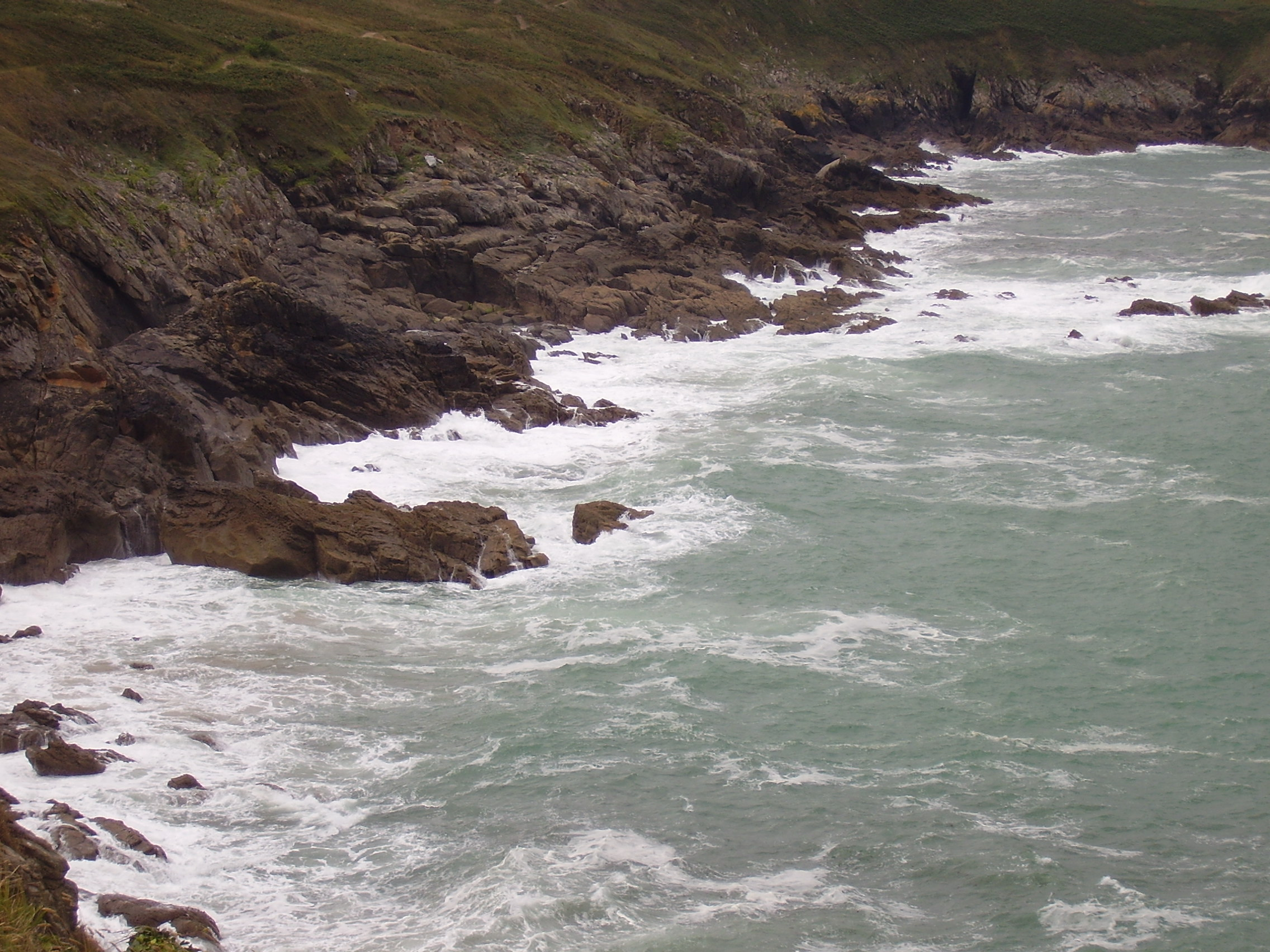 Pointe du Grouin, Frankreich